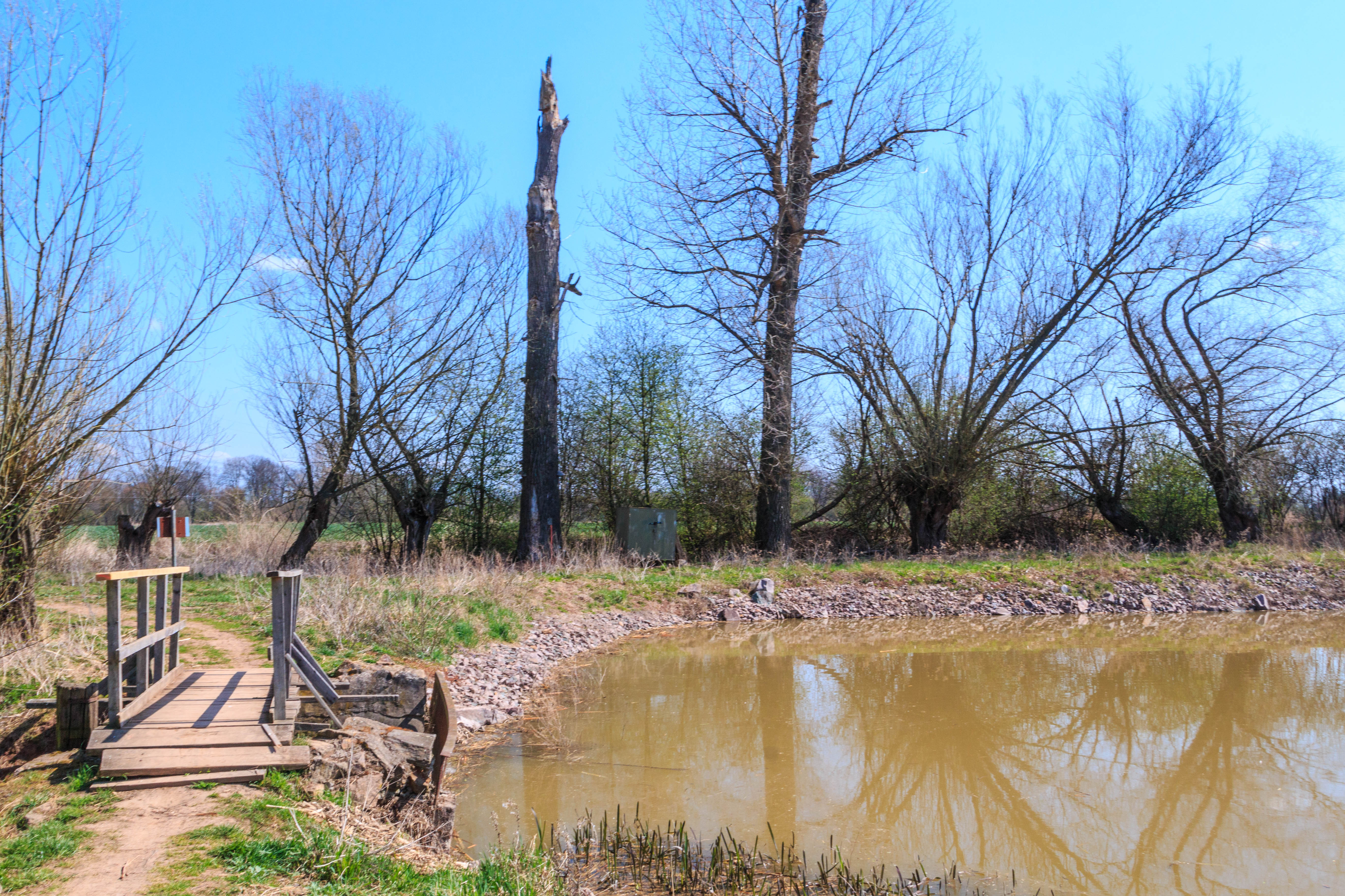 Rybník Tišina u Labětína Project: Vodstvo.